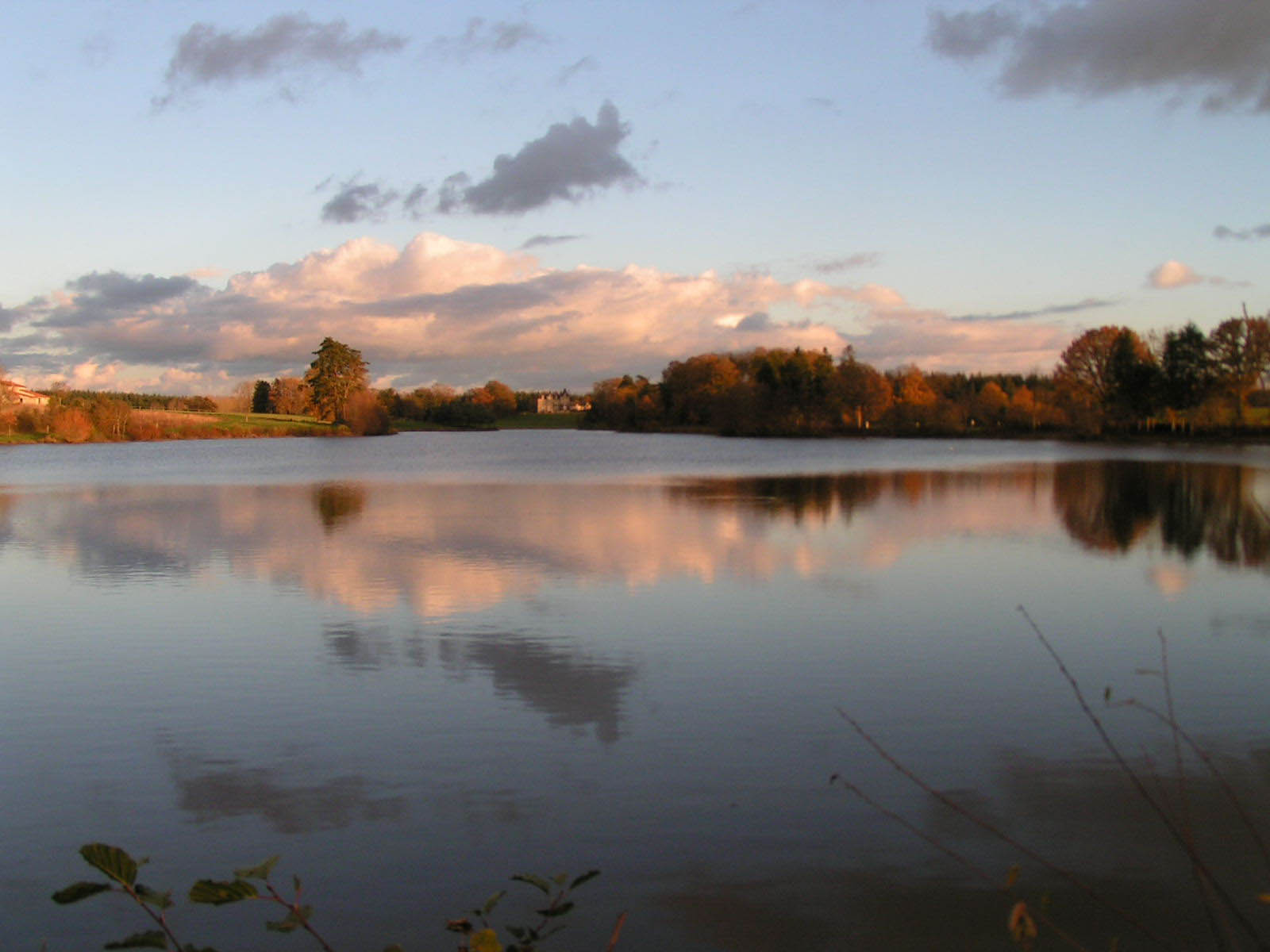 Le château du Rortheau et le lac y attenant à Dompierre sur Yon, Vendée. Auteur: Olivier Coutanceau, particulier